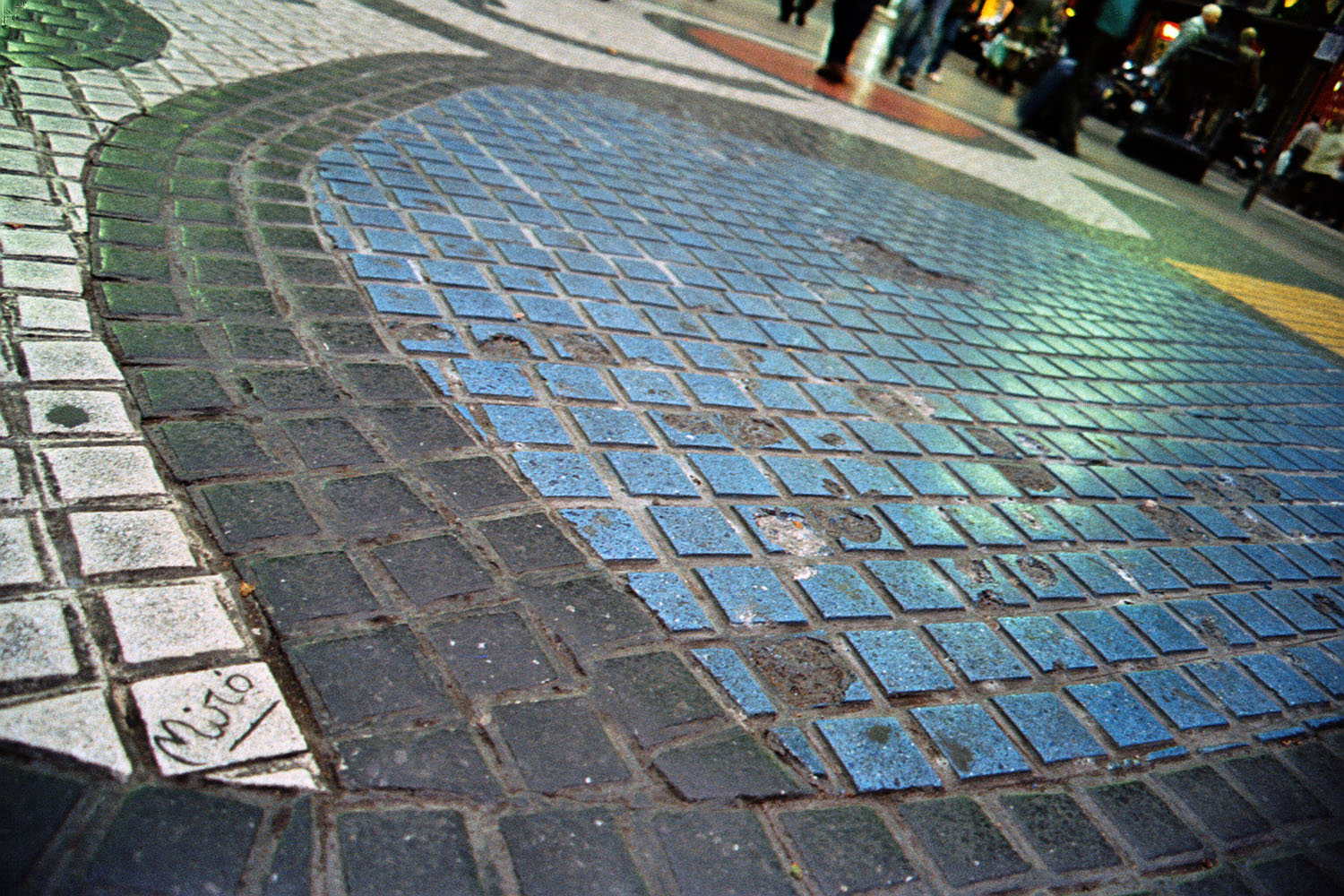 Mosaico Mirò sulla Rambla